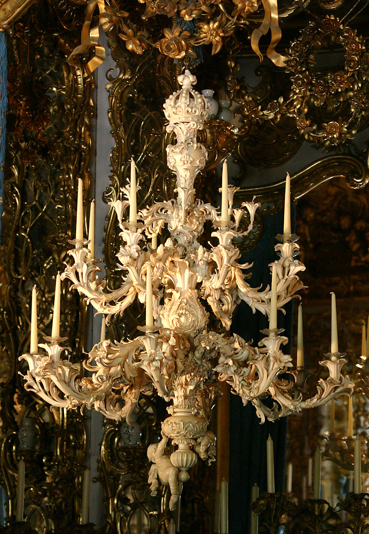 Porcelain Chandelier, Schloss Linderhof, Upper Bavaria.